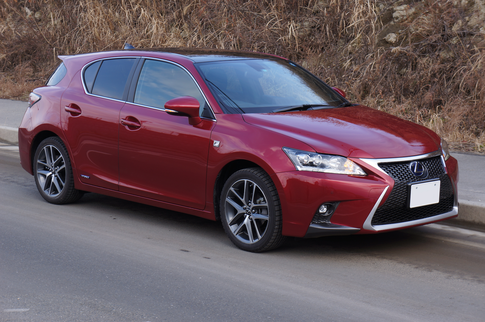 Lexus CT200h Fsport 2014